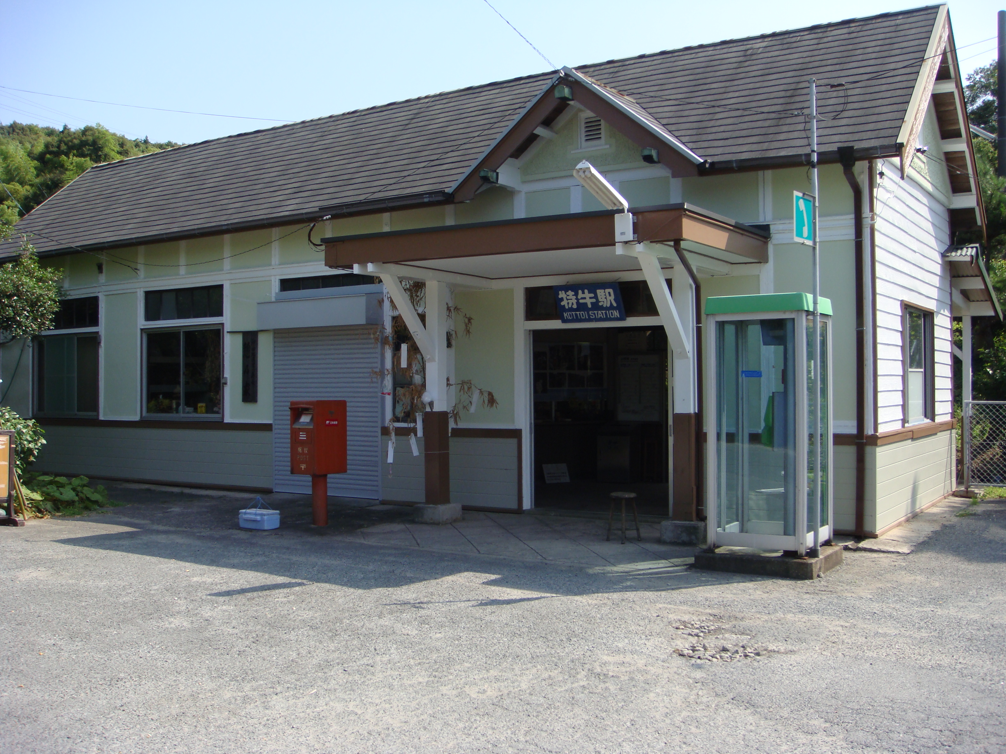 特牛駅舎(2008.07.26に投稿者が撮影)